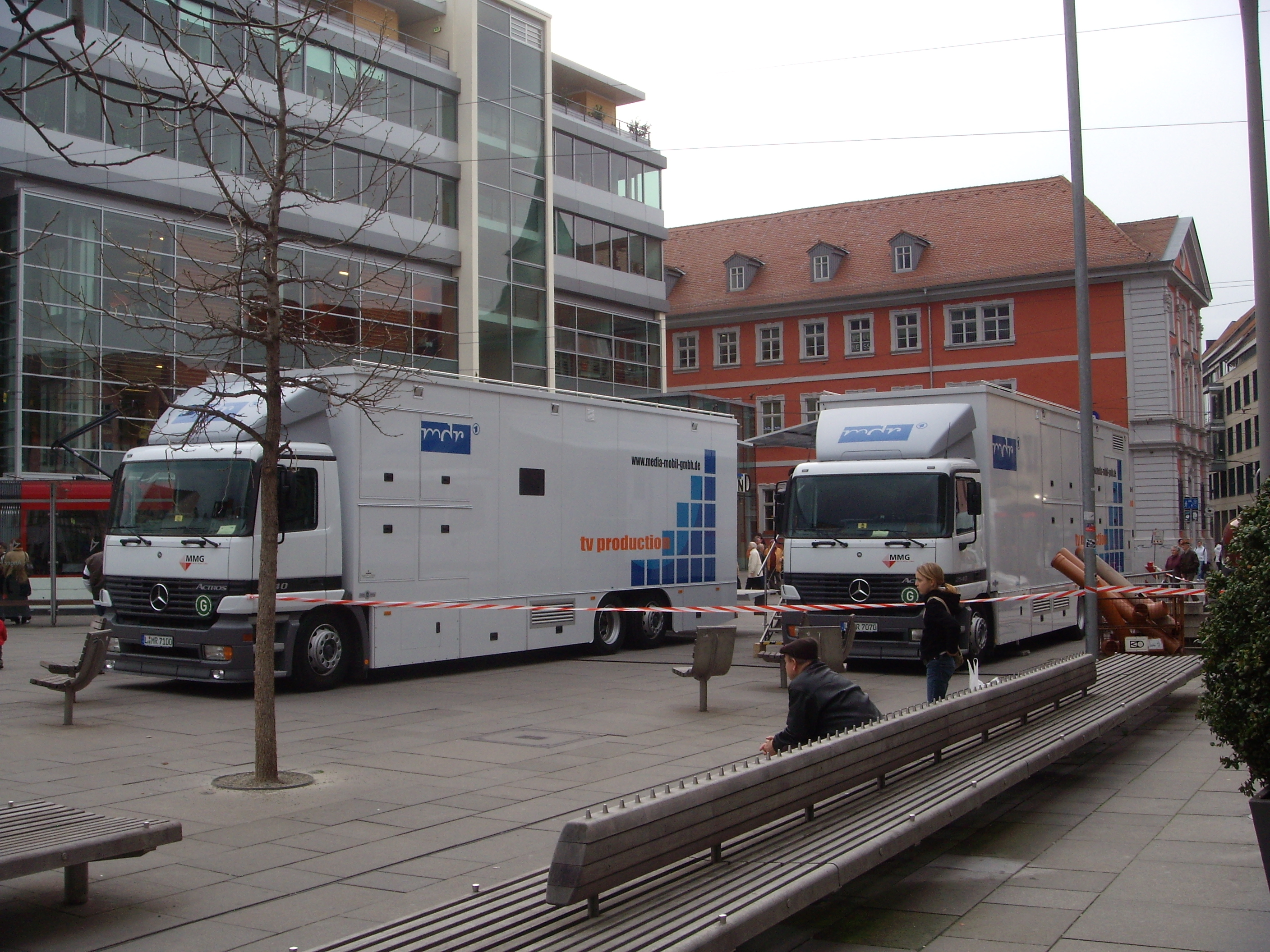 Übertragungswagen des MDR in Vorbereitung der Talkshow "Unter uns" im Anger Mair auf dem Anger in Erfurt.